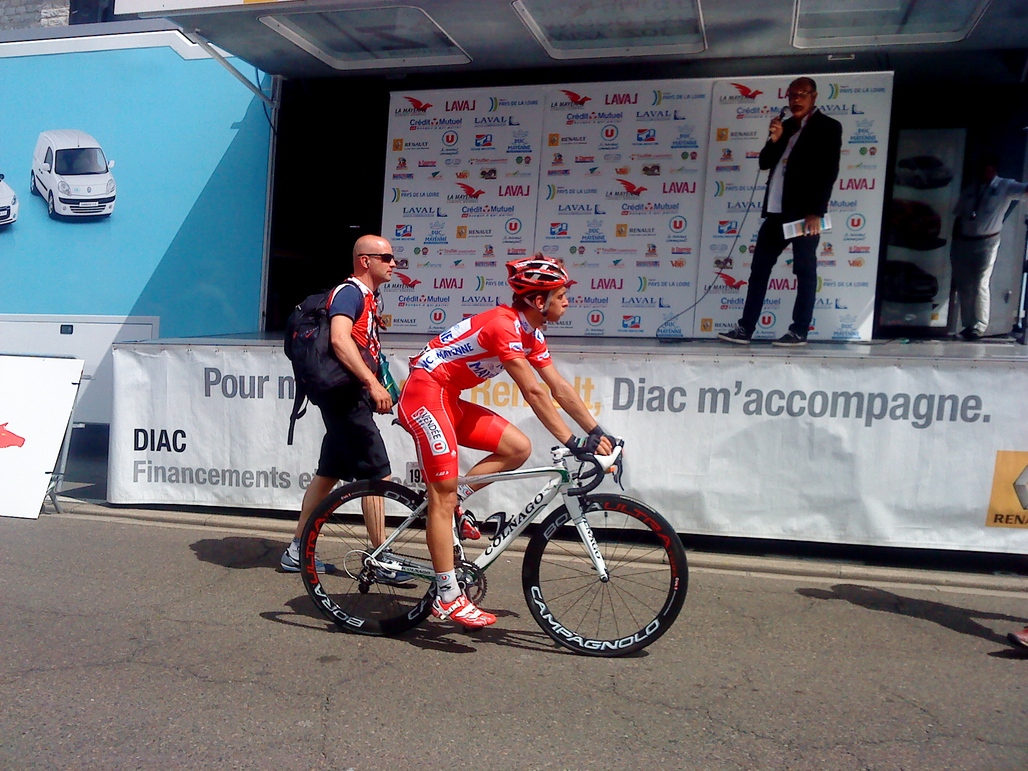 Bryan Coquard lors de la dernière étape des Boucles de la Mayenne 2012 à Laval